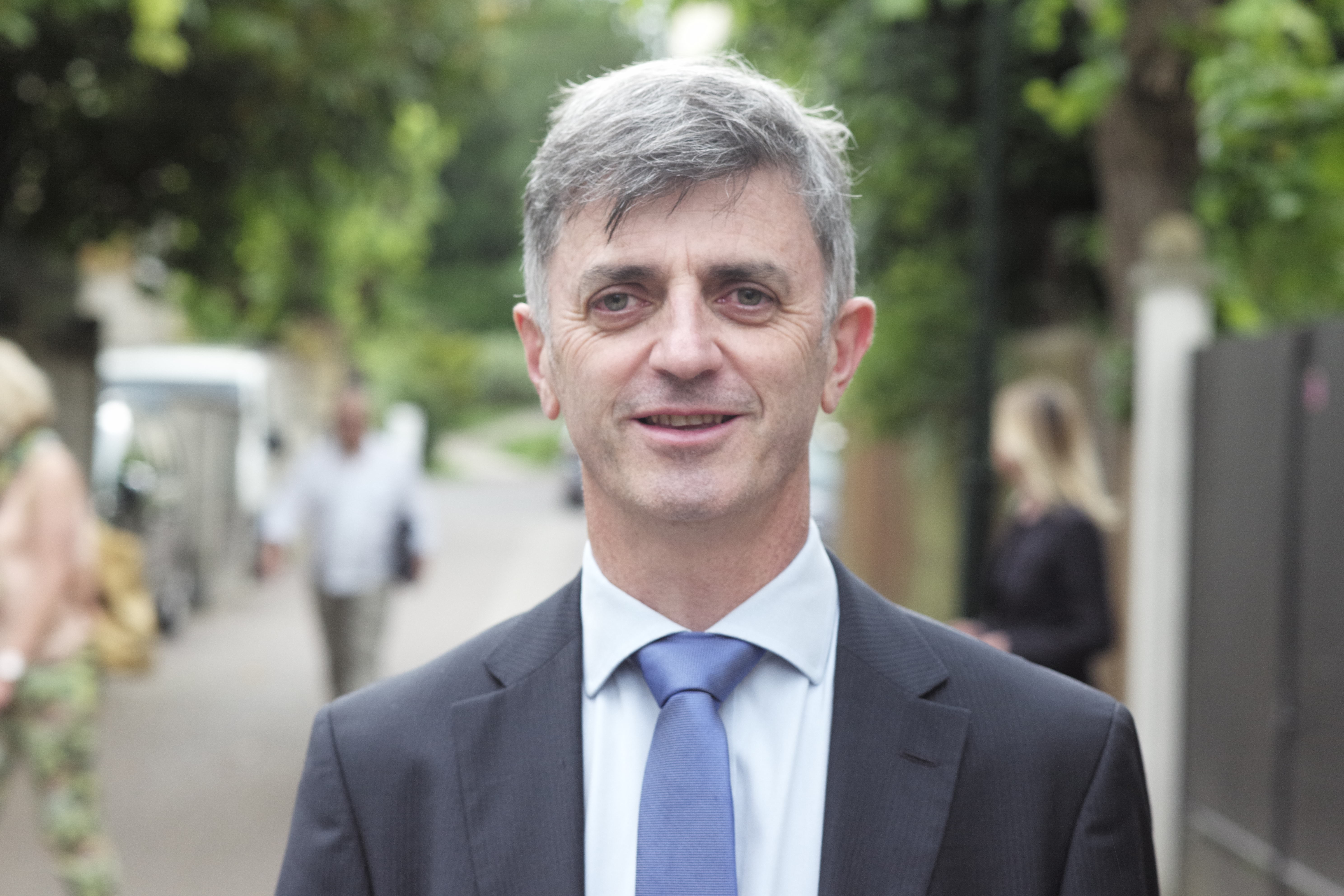 Photos prise par Philippe Bartouil, à meudon